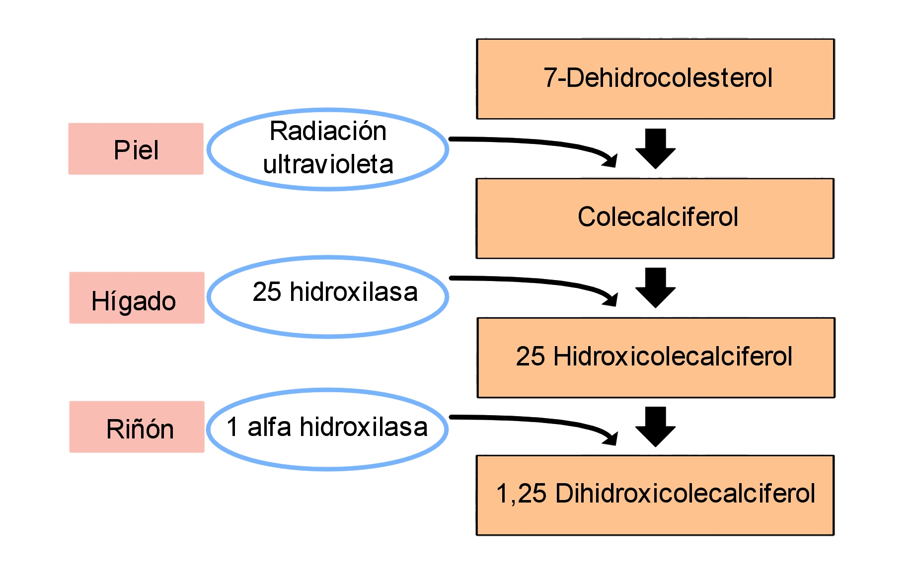 Esquema que muestra la transformación de colecalciferol (vitamina D3) en su forma activa (calcitriol).